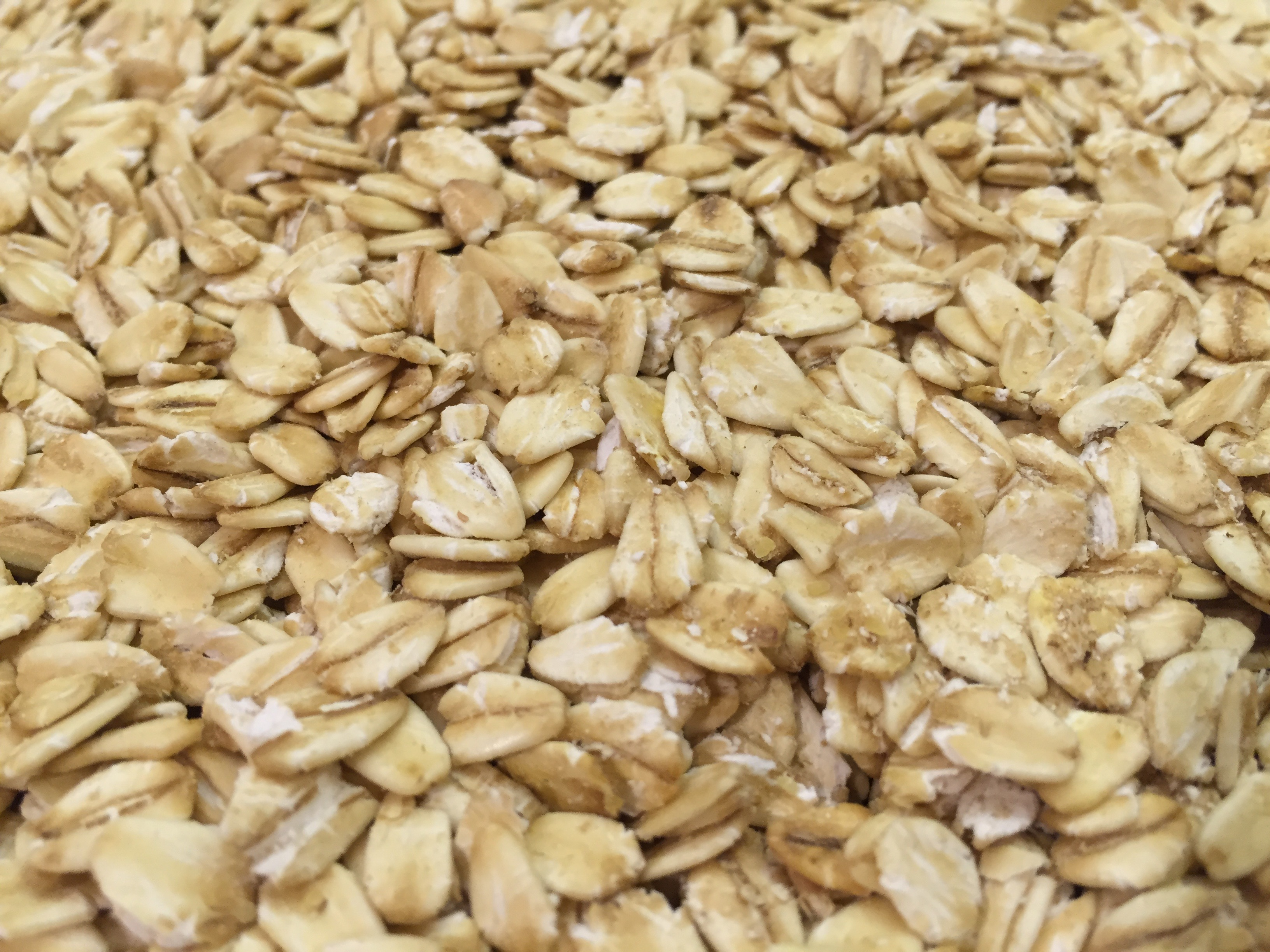 גרעיני שיבולת שועל ששוטחו בעזרת רולרים לאחר אידוי